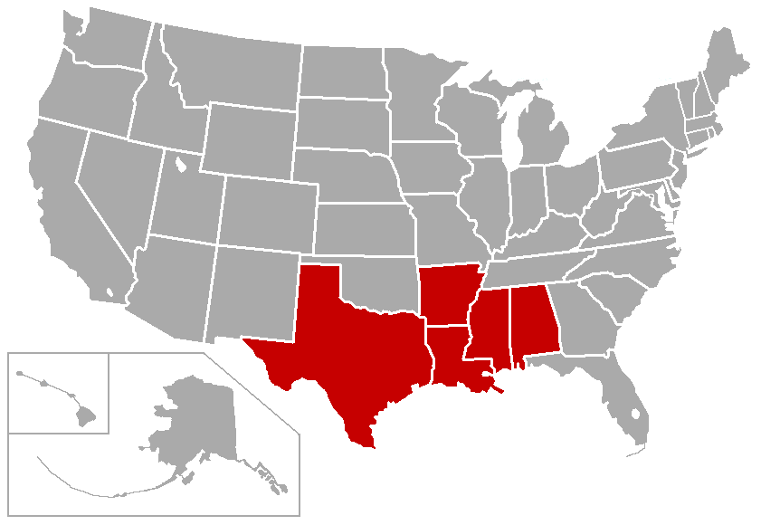 Derived from here